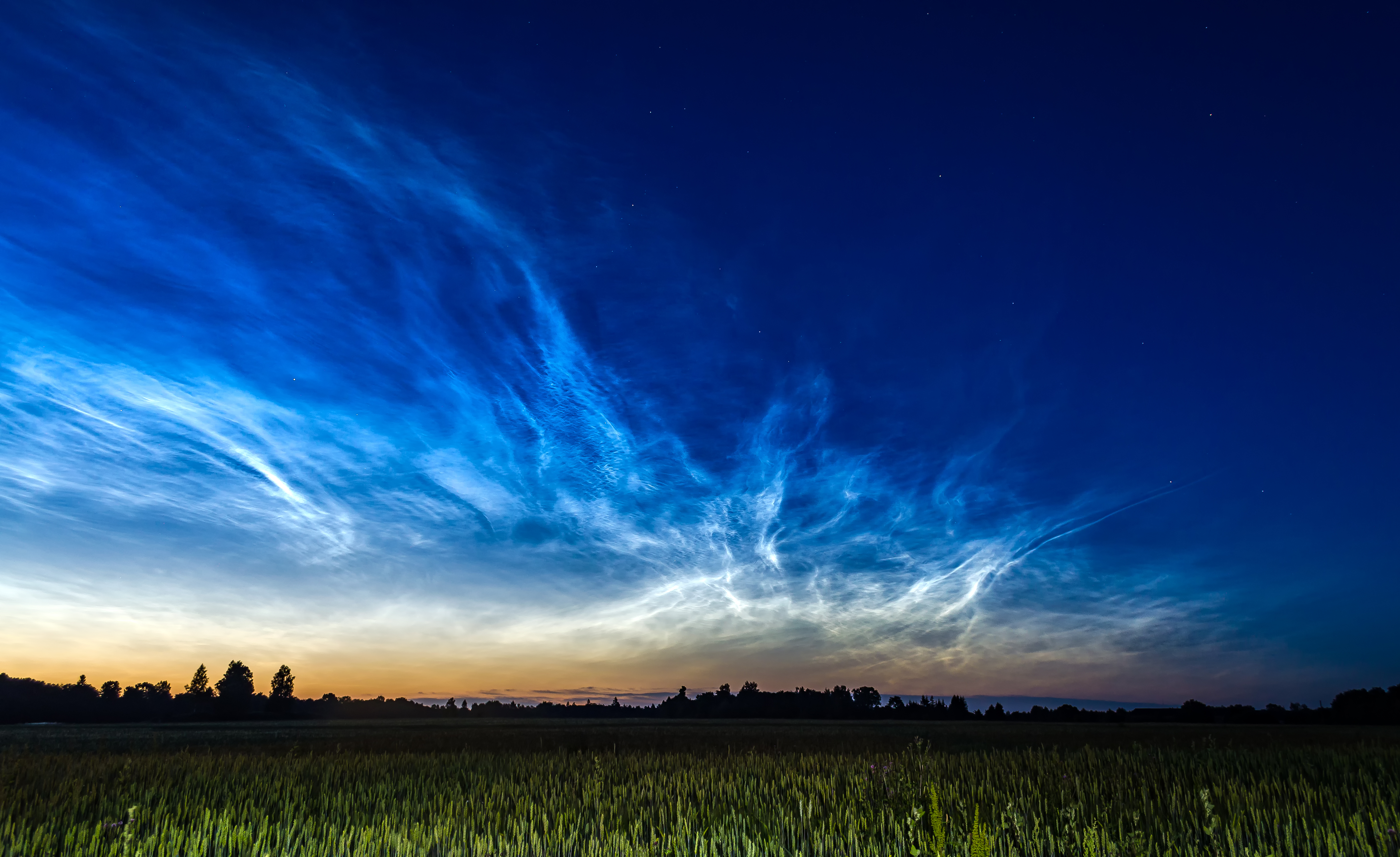 Noctilucent Clouds